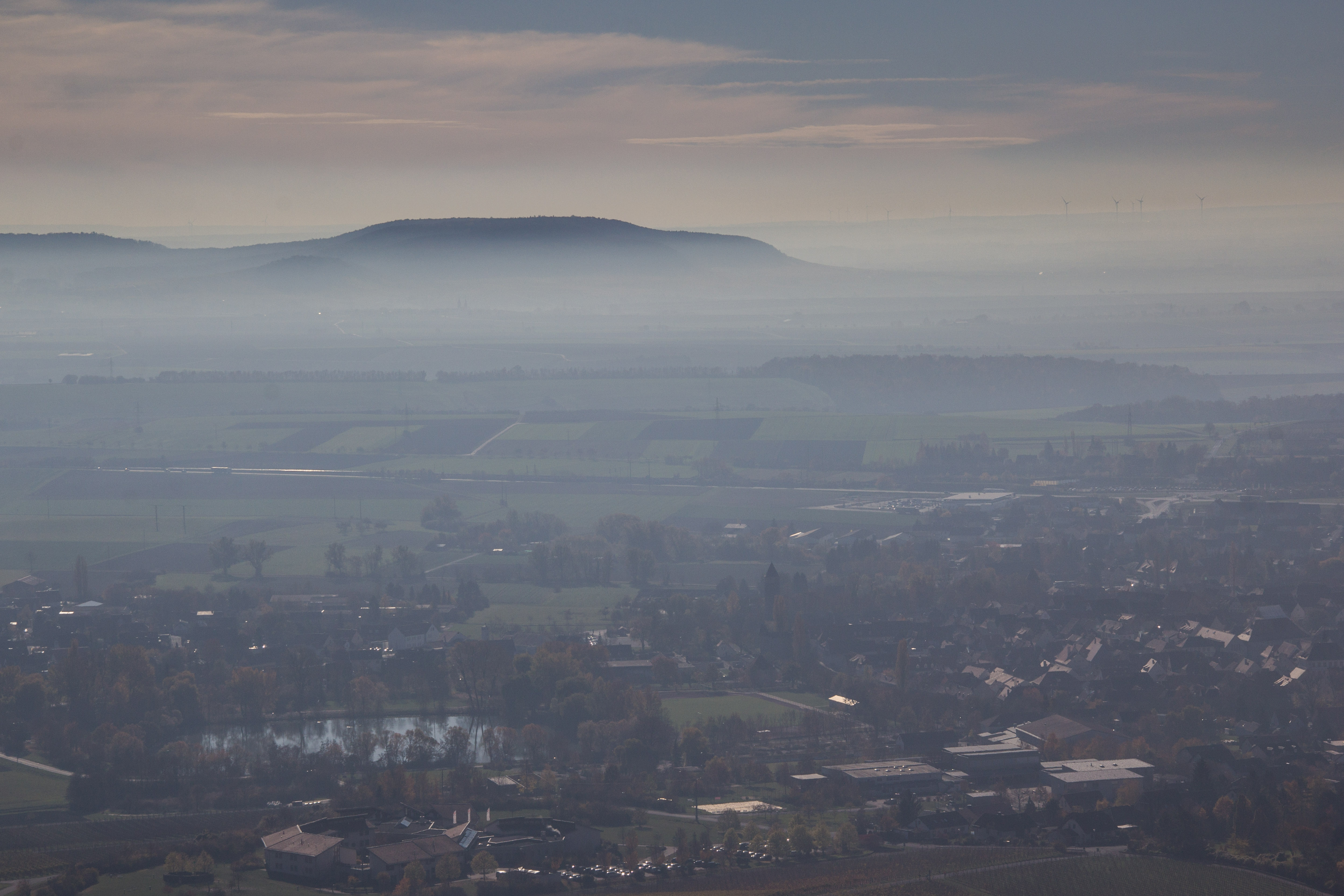 Schwanberg, Blick zum Kalbberg, Iphofen, Landschaftsschutzgebiet und Naturparks Steigerwald, Vogelschutzgebiet Südlicher Steigerwald, FFH-Gebiet Vorderer Steigerwald mit Schwanberg